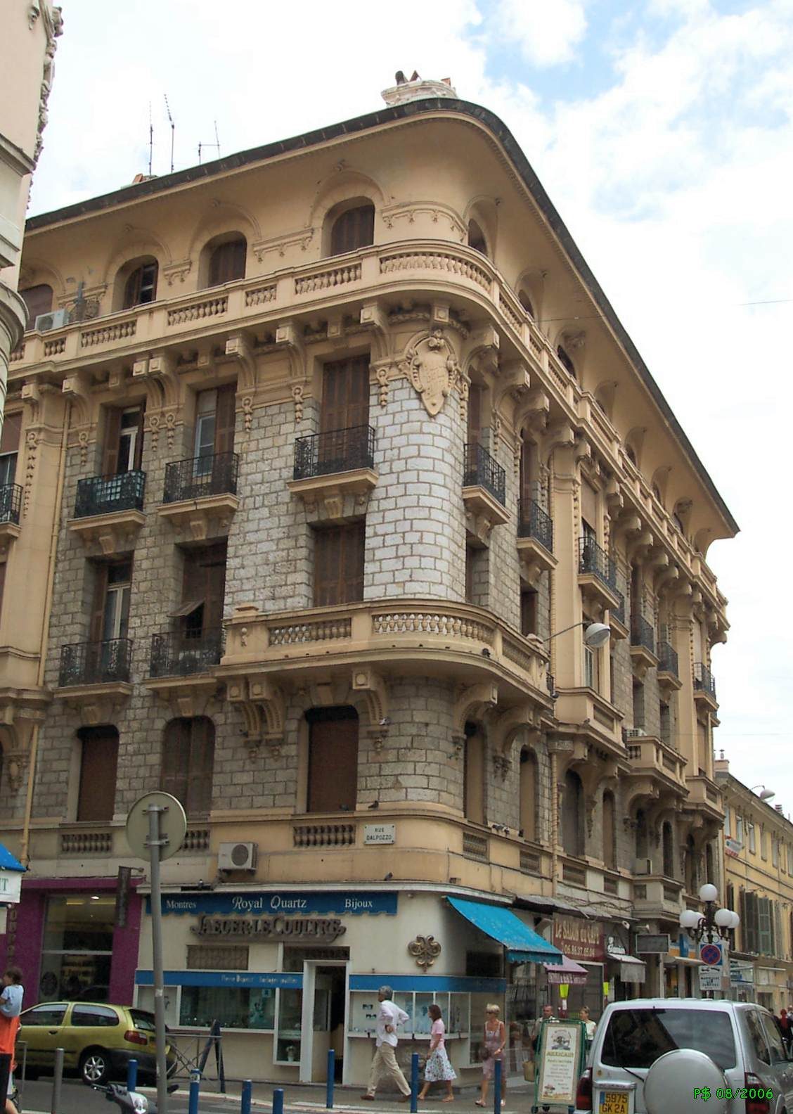 Nice - Quartier des Musiciens - Palais de Nice Palais de la Buffa - Nice-Quartier des musiciens - angle Rue Meyerbeer et Rue de France